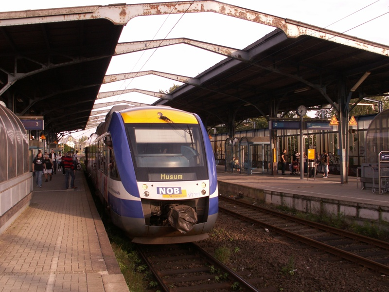 Bf Plön